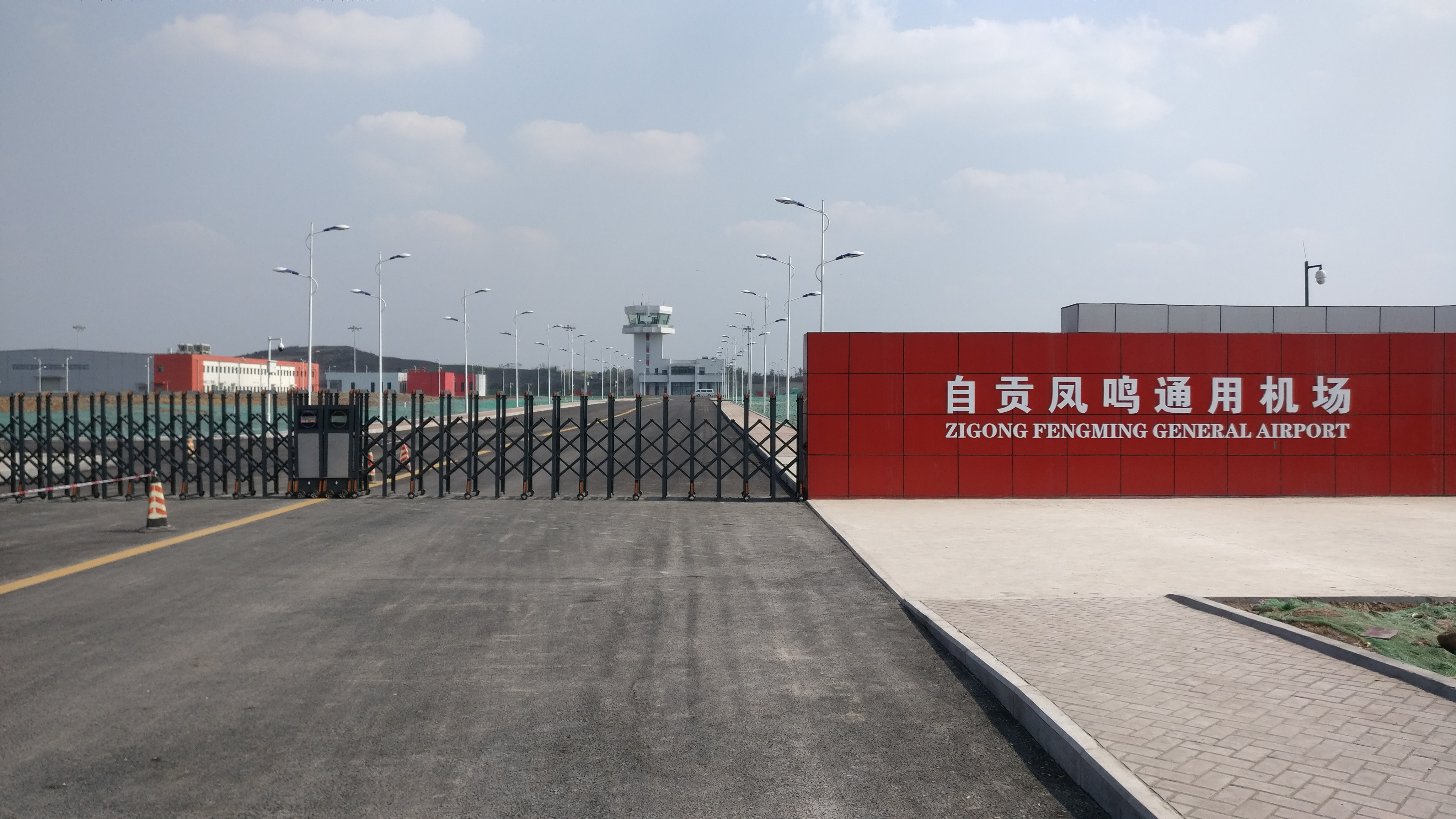 中文（中国大陆）: 自贡凤鸣通用机场入口